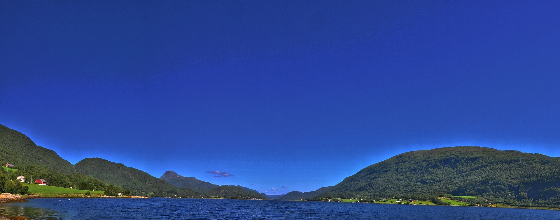 Bøfjorden i Surnadal kommune, Møre og Romsdal, Norge